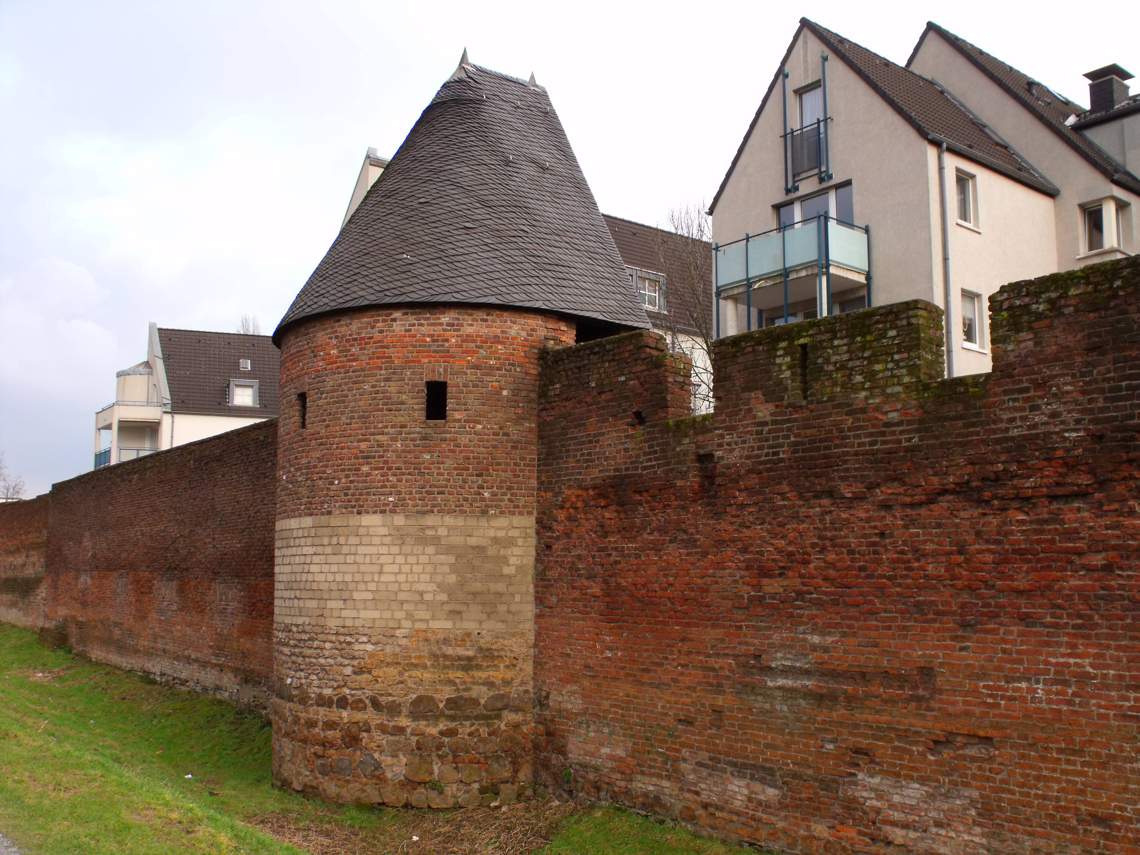 Außenseite des Turmes der Duisburger Stadtmauer